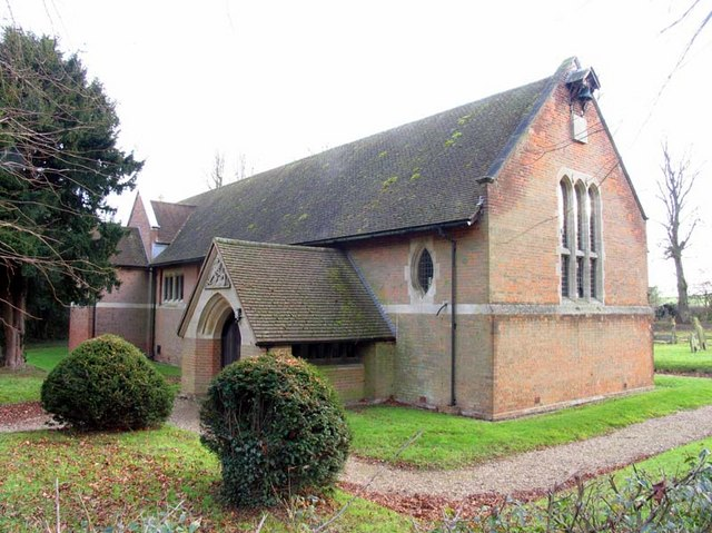 St Michael, Woolmer Green, Herts